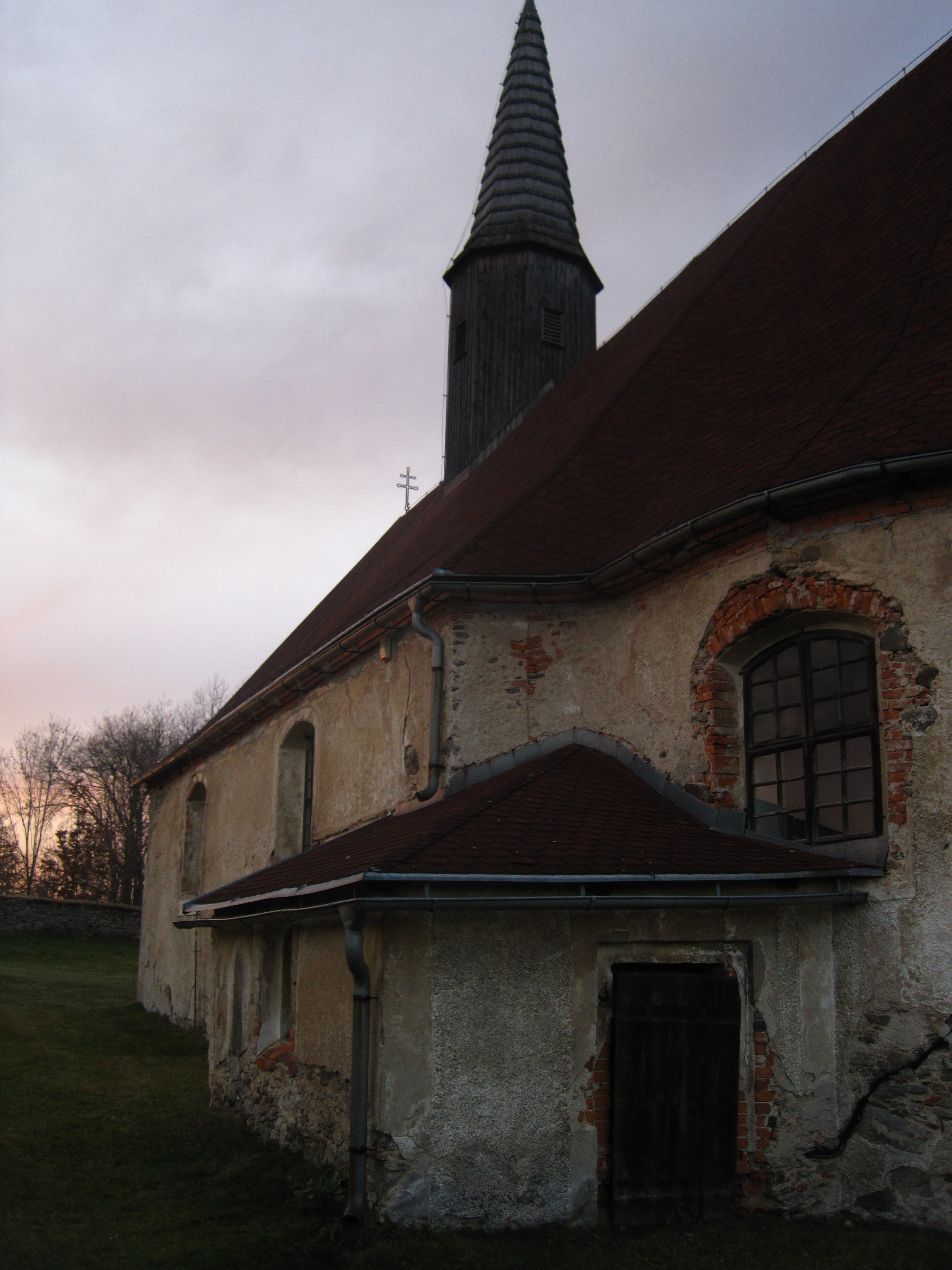 Kostel svatého Martina, střed obce, Dolní Oldřiš.